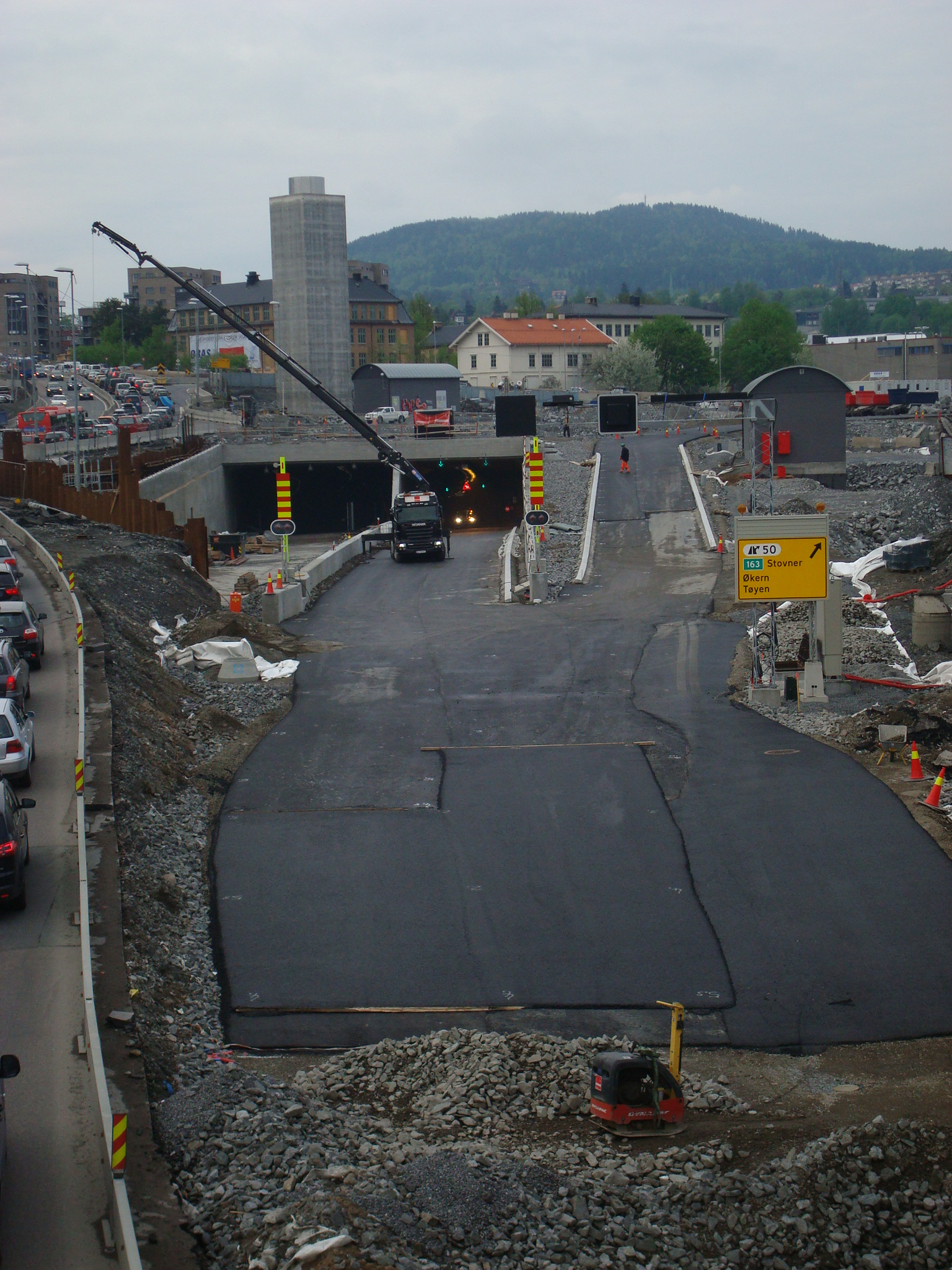 Lørentunnelen under bygging. Sett fra Økern.